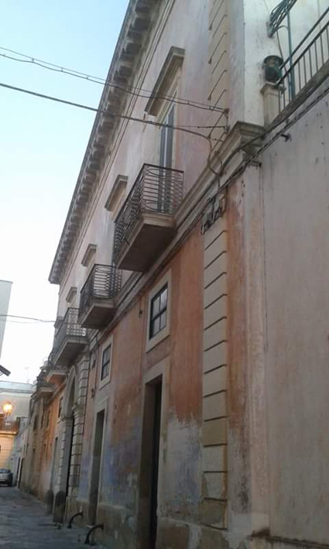 Palazzo Tafuri a Nardò (LE)-PUGLIA-ITALY